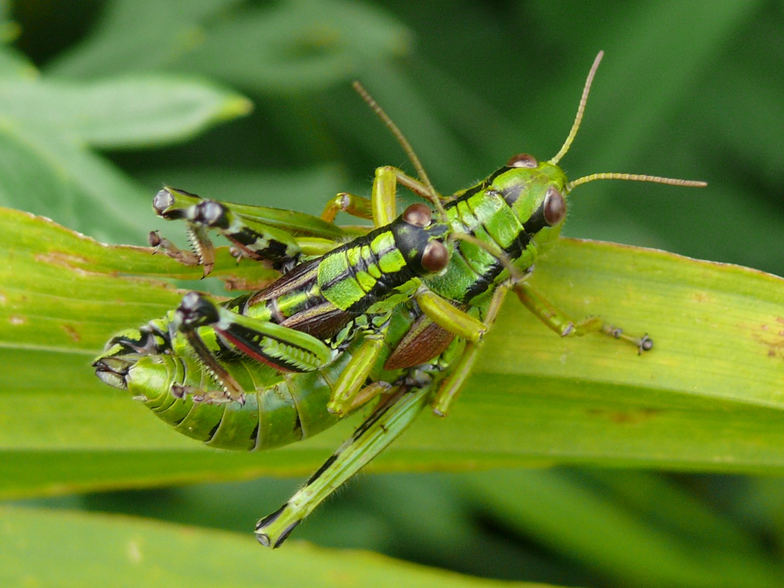 Miramella alpina